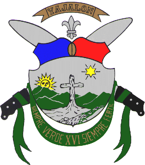 Escudo del Municipio de Yajalón (Chiapas)